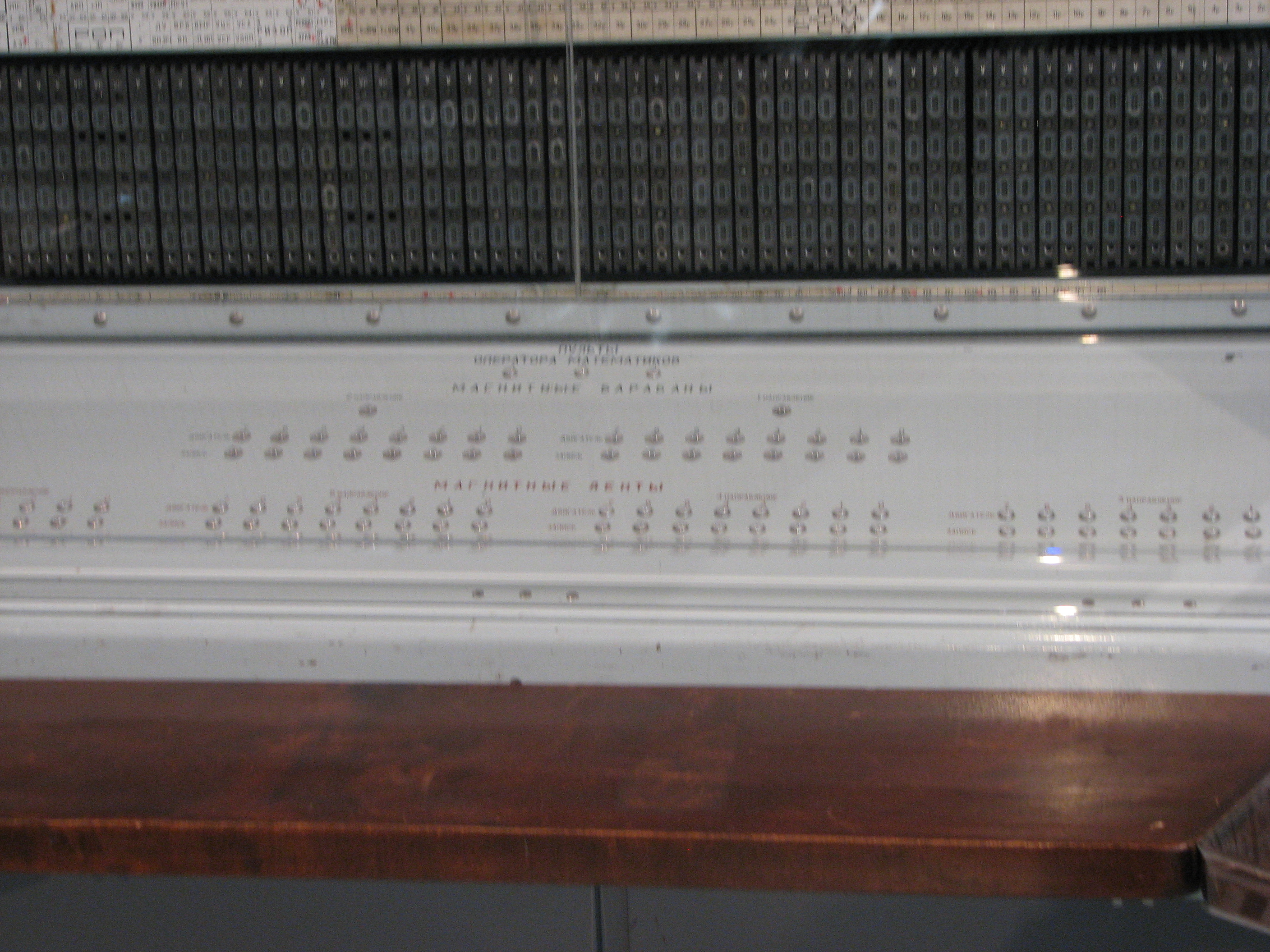 Консоль центрального вычислителя (стойка устройства управления)